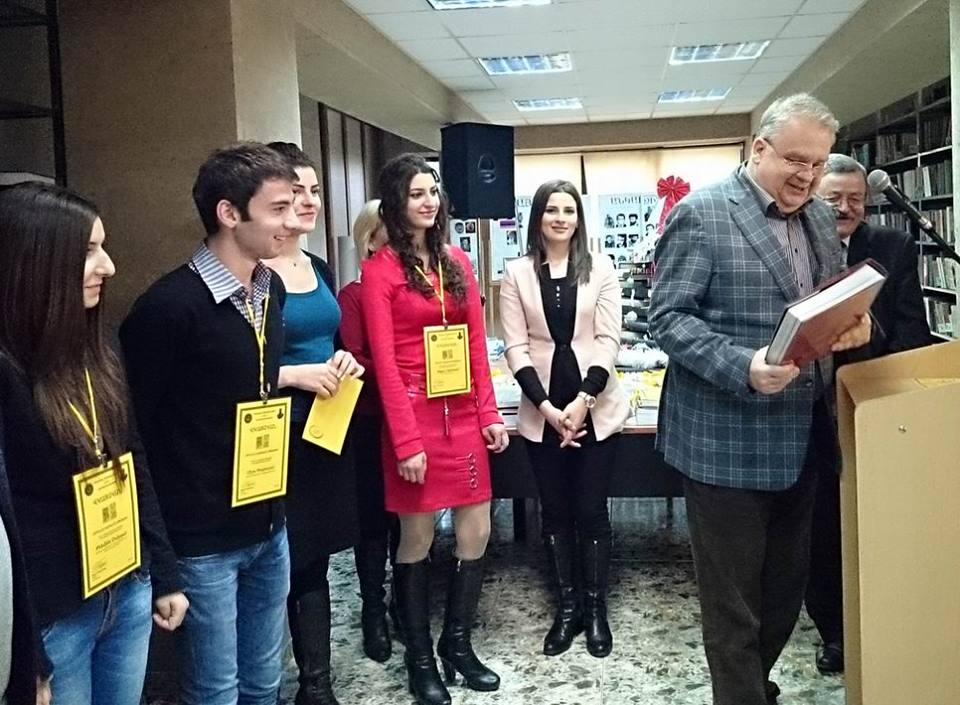 հումանիտար գրականության ընթերցասրահ